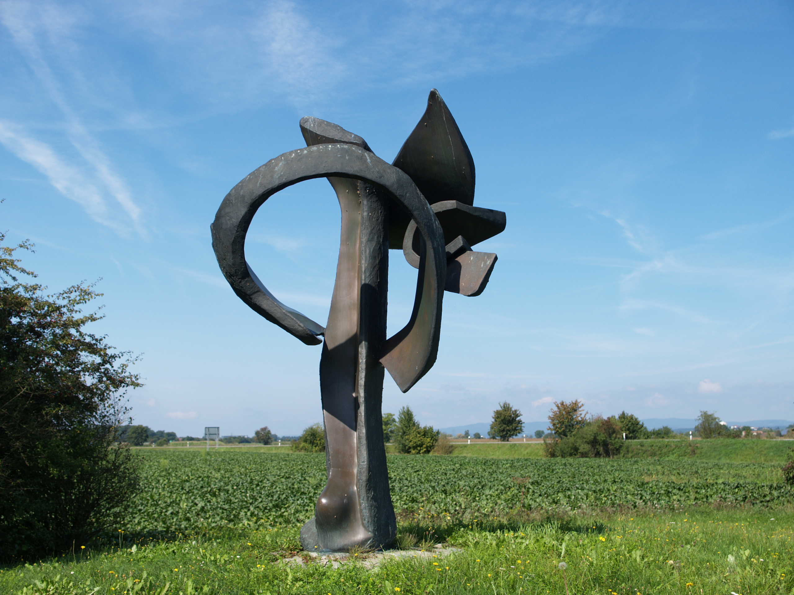 Brückenskulptur an der SR22 bei Ainbrach; Künstler: Hans Rieser Object location48° 53′ 01.32″ N, 12° 42′ 33.78″ E